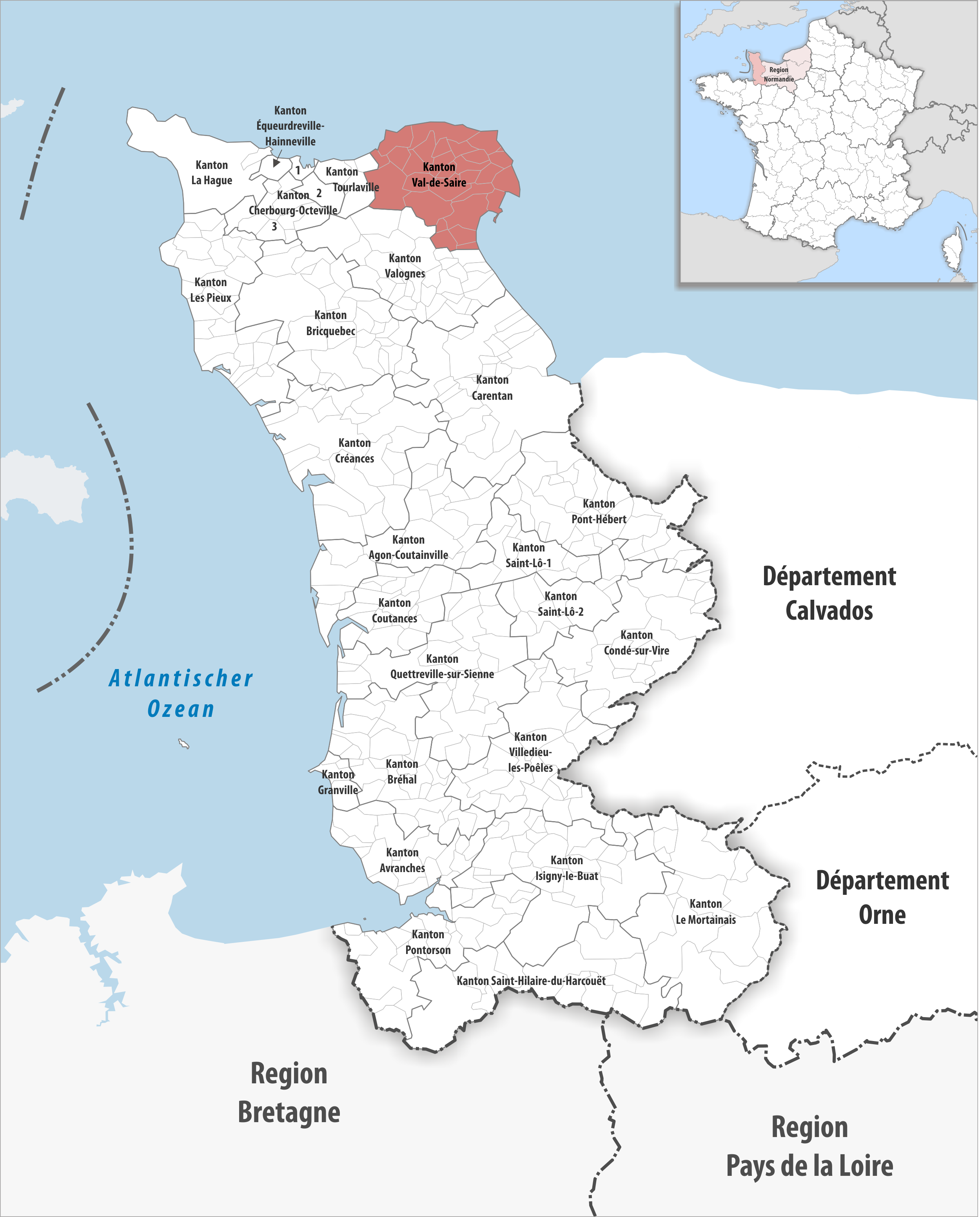 Lage des Kantons Val-de-Saire